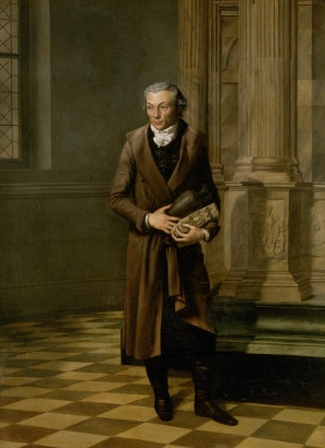 Portrait of French archaeologist Alexandre Lenoir (1761-1839) Représentation : Alexandre Lenoir tenant l'urne des cendres de Molière devant le tombeau de François Ier remonté au Musée des monuments français.